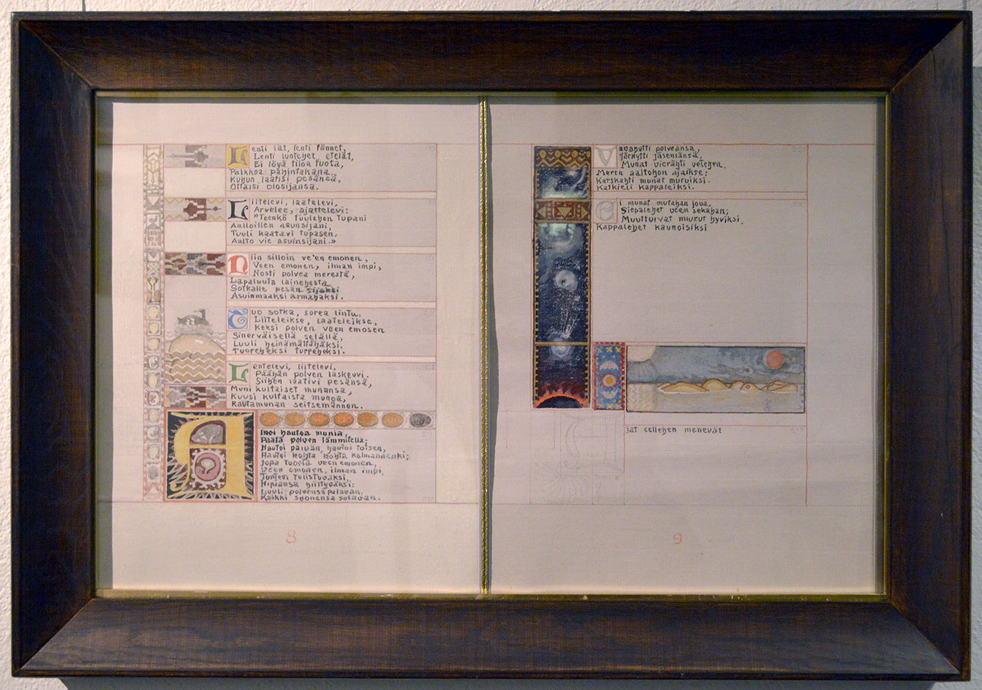 Valokuva Akseli Gallen-Kallelan Suur-Kalevalaa varten tekemästä kuvitusluonnoksesta: Runo I "Lenti iät, lenti lännet...", 1920